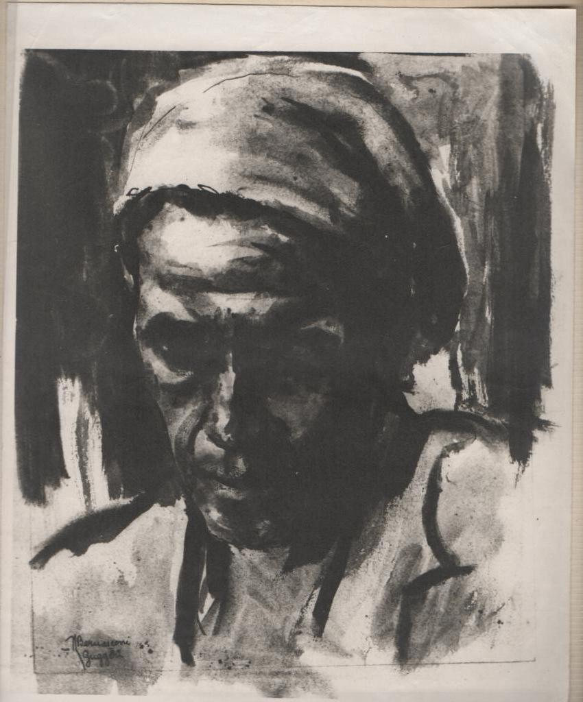 N.Bernasconi Guggeri_ Gitano _alquitrán